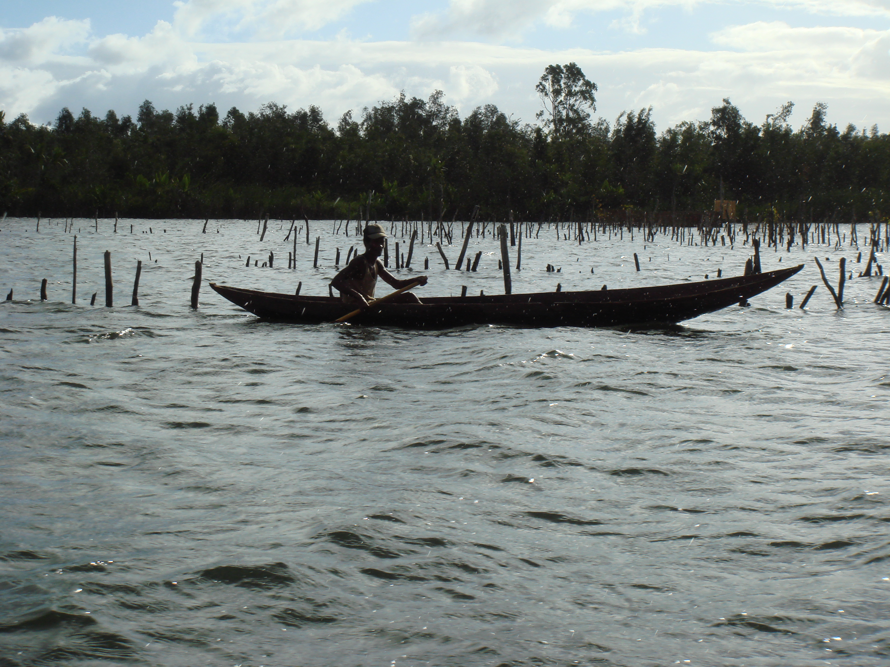 Canal des Pangalanes, Madagascar